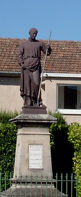 Statue de Saint Gens située à Monteux